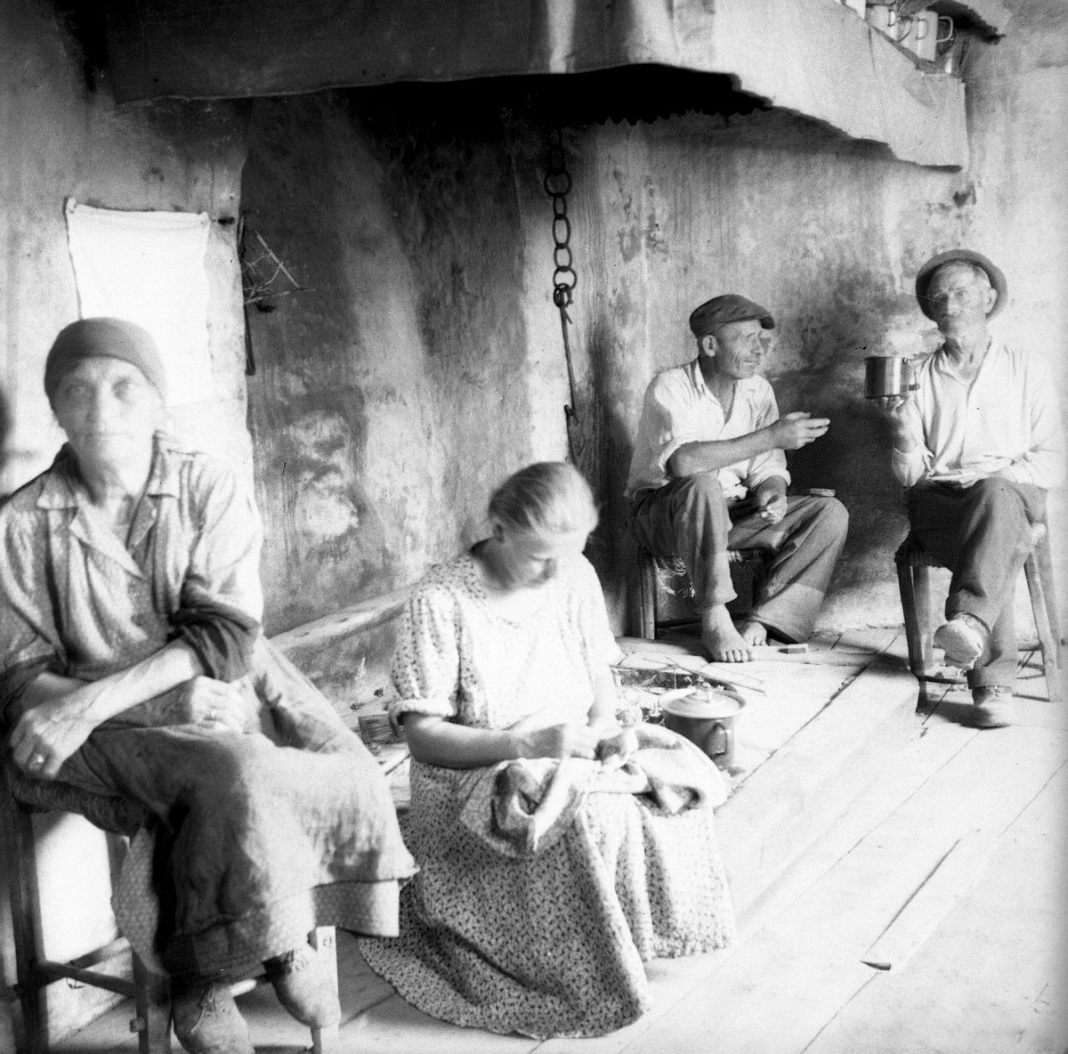 Fameja Gireti ob ognjišču v Kučjem Bregu.